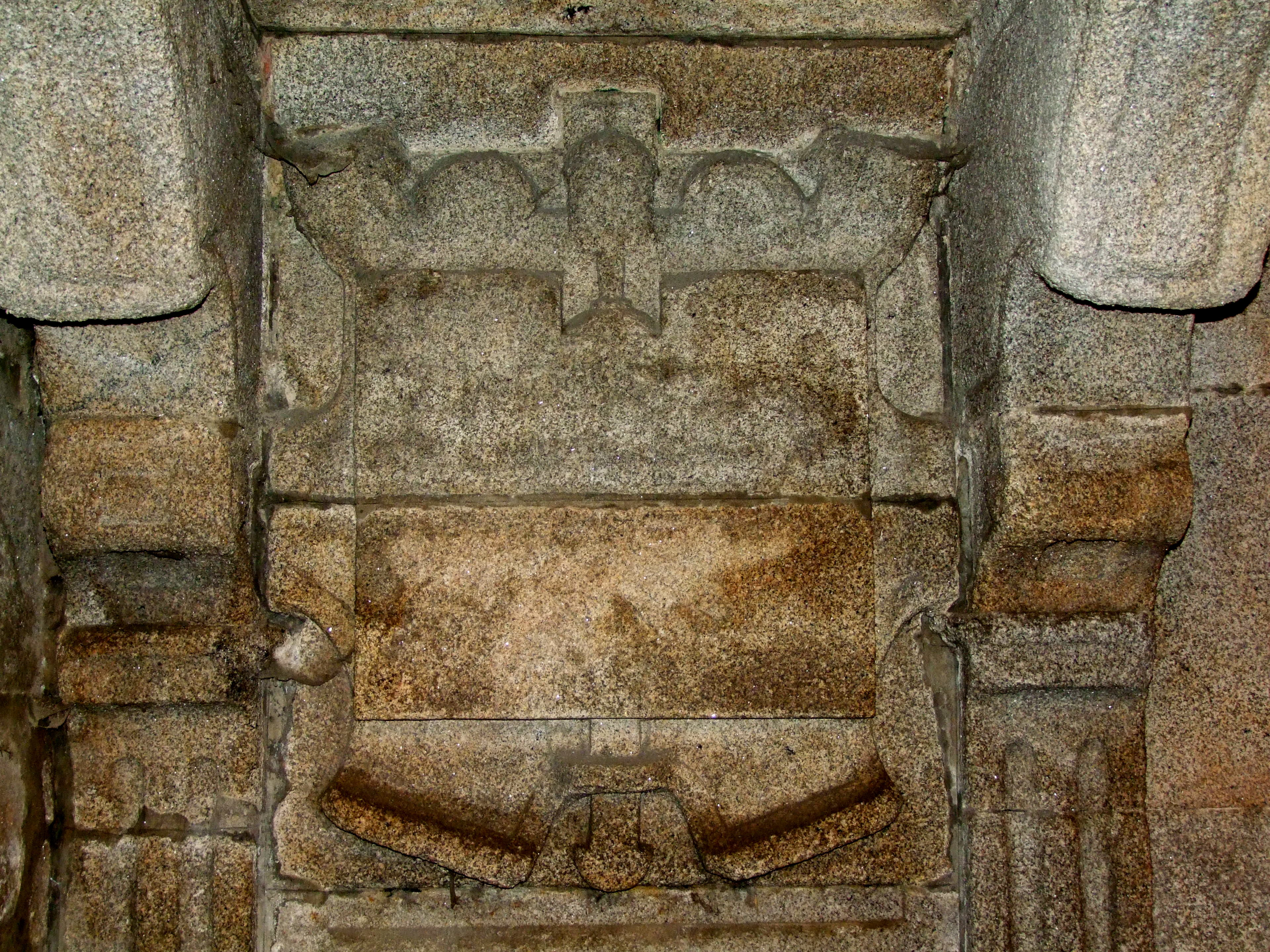 Chafariz da Colher, Miragaia, Porto, Portugal (DSCF2116)